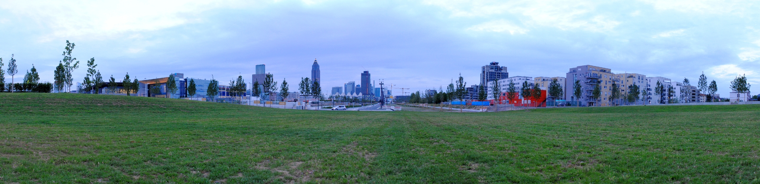 Europaviertel vom Europagarten aus gesehen, Blick Richtung Osten/Innenstadt